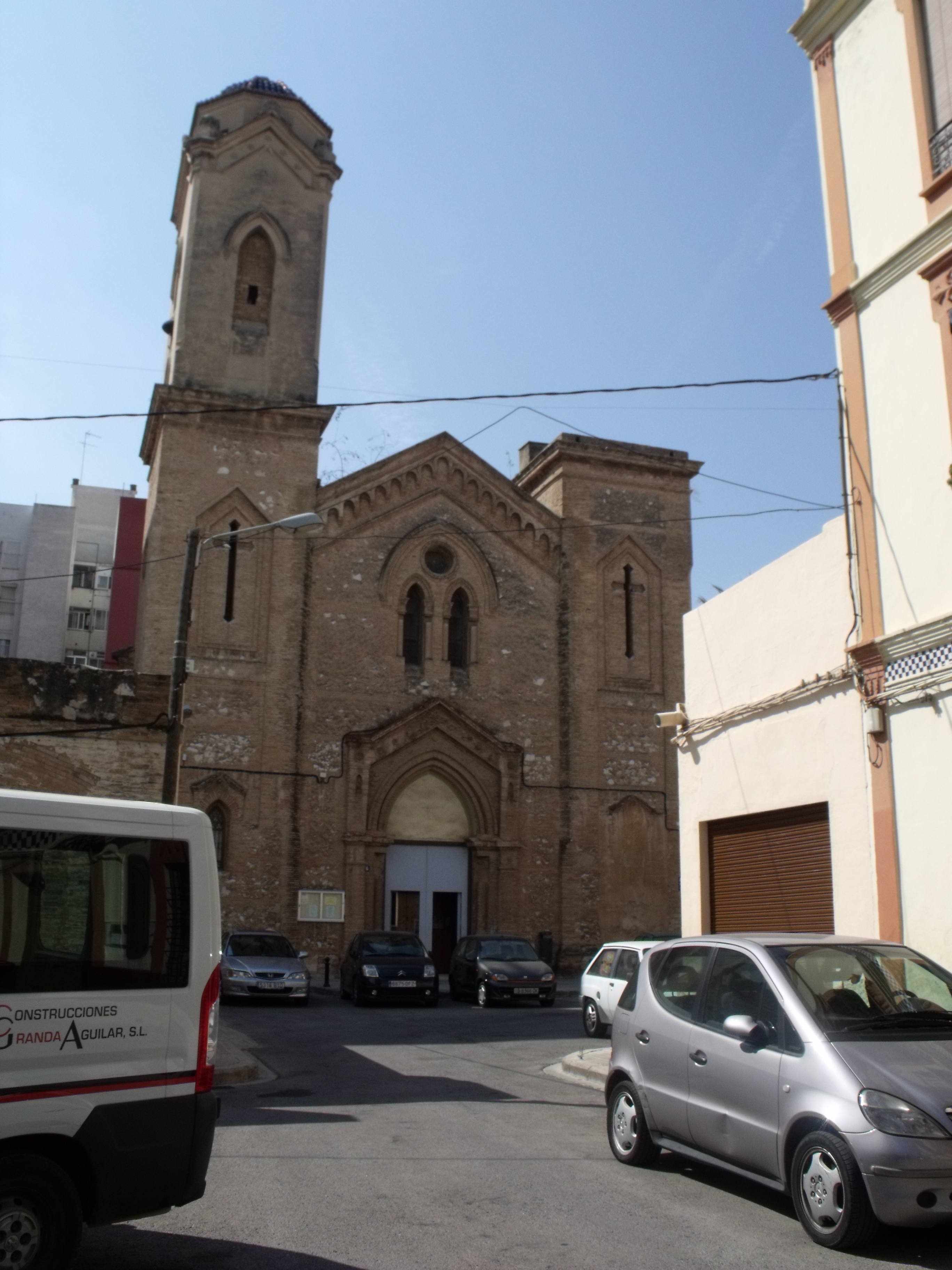 Iglesia parroquial del Cristo de la Providencia, Valencia.